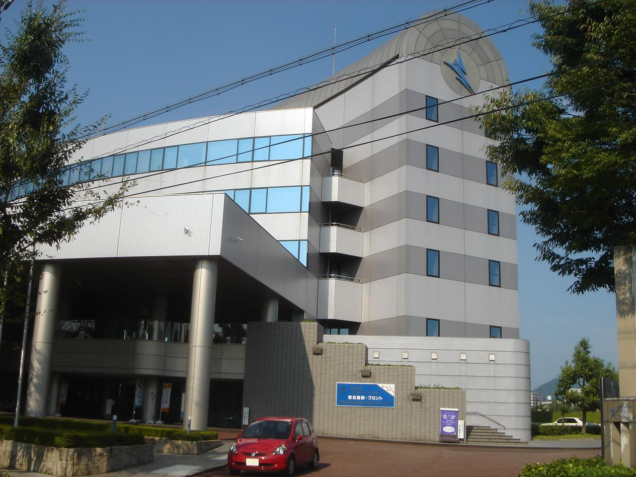 Nagaragawa Sports Plaza in Gifu（長良川スポーツプラザ）,Gifu,Gifu,Japan(岐阜県大垣市)で撮影。